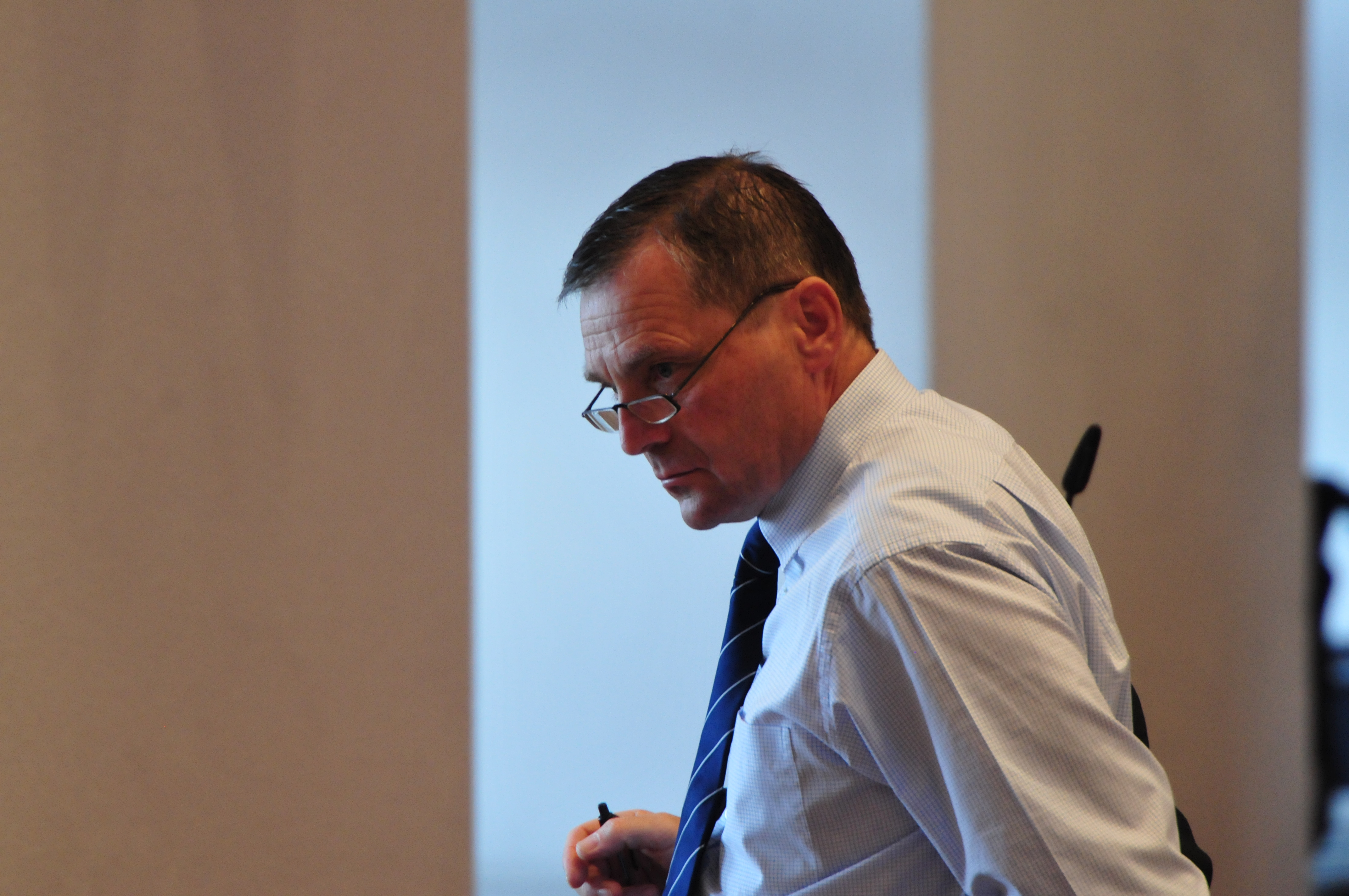 Landtagssitzung des Landtages von Mecklenburg-Vorpommern in Schwerin am 19. Juni 2013.